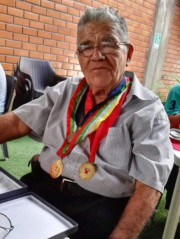 Palmas Magisteriales recibidas de parte el Estado Peruano y de la Municipalidad Provincial de Coronel Portillo de la Región Ucayali